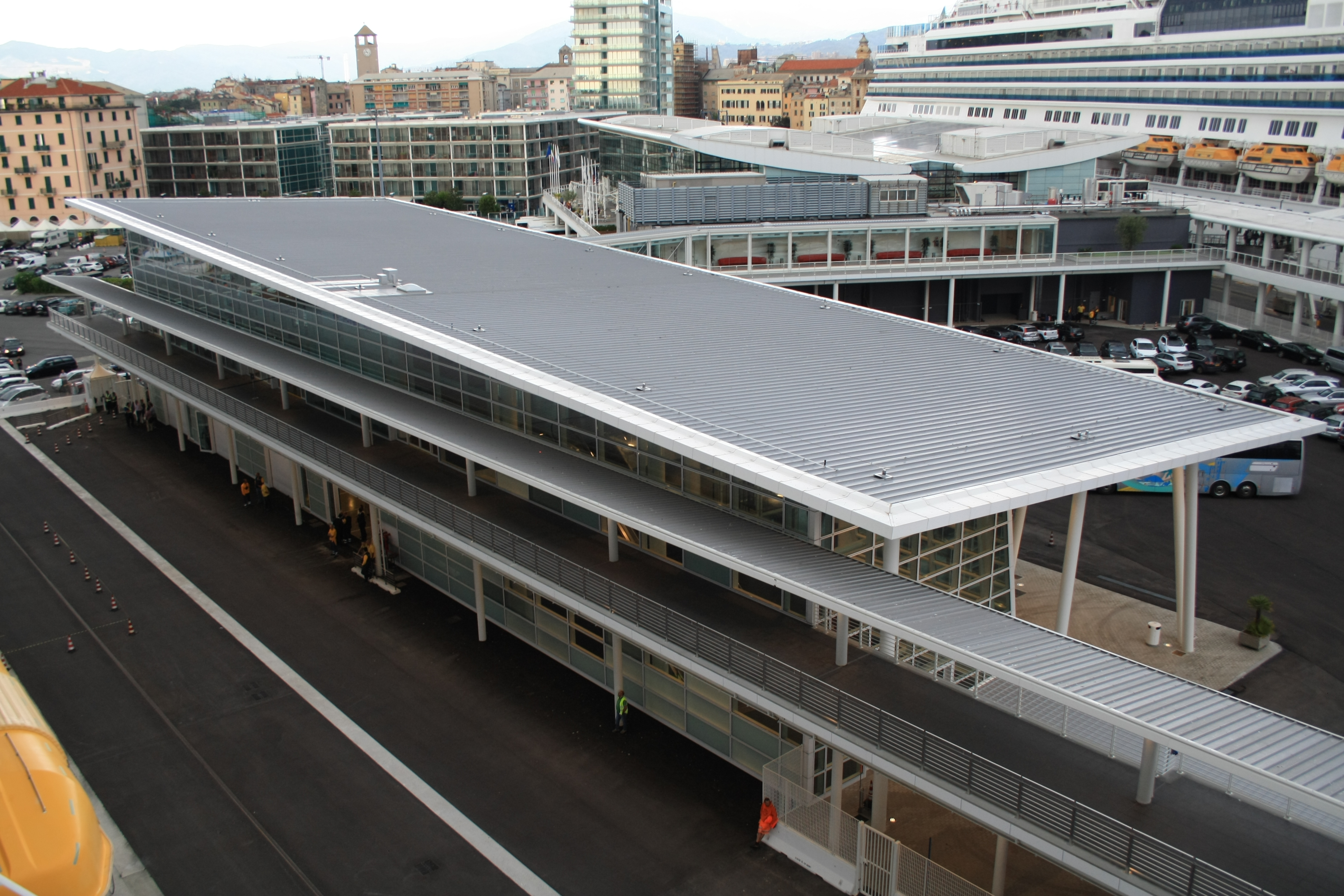 Vista sul complesso del Palacrociere di Savona